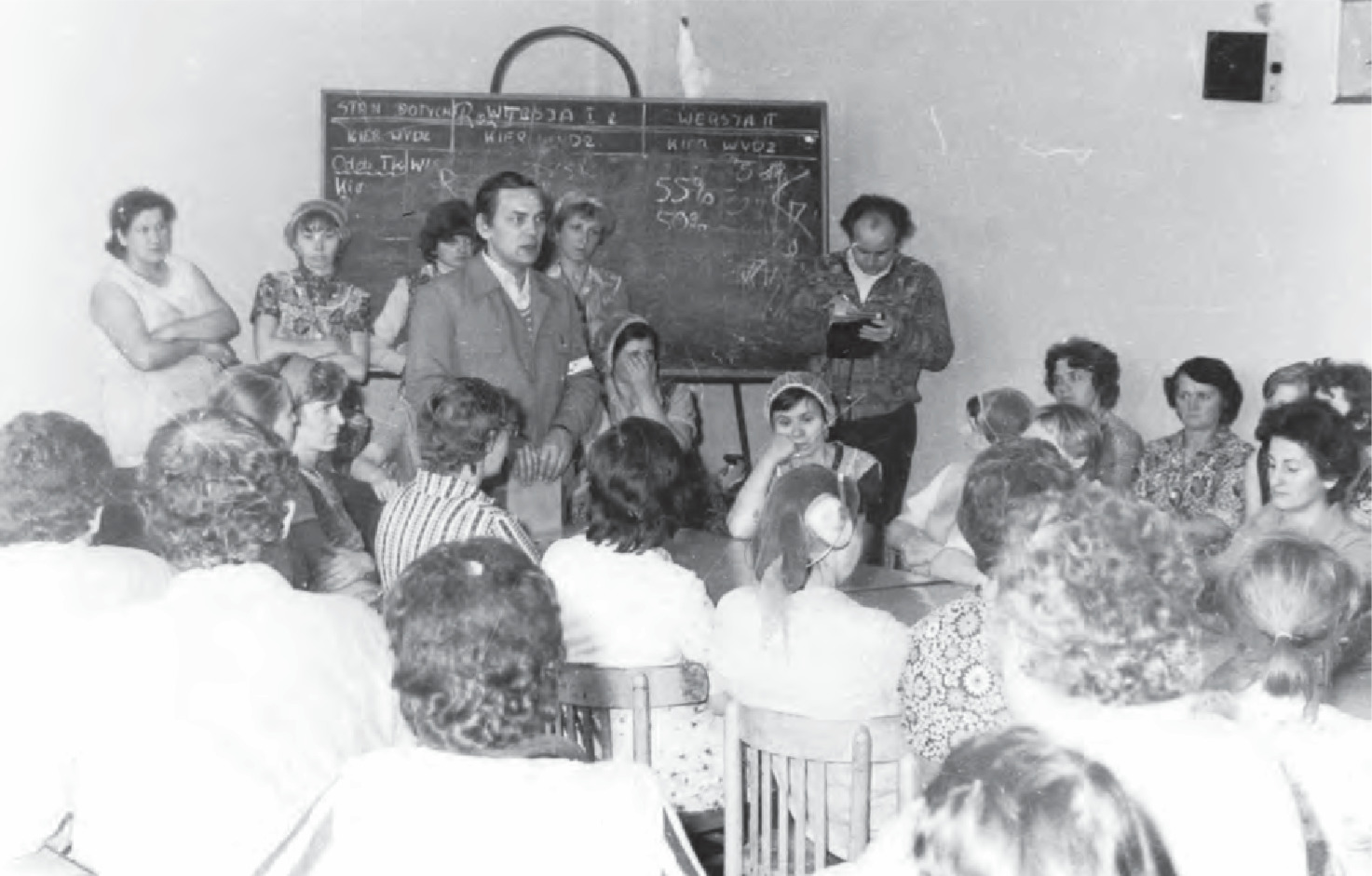 Tkalnia Zakładów Przemysłu Bawełnianego „Frotex”, Włodzimierz Pucek przemawia do tkaczek podczas strajku.